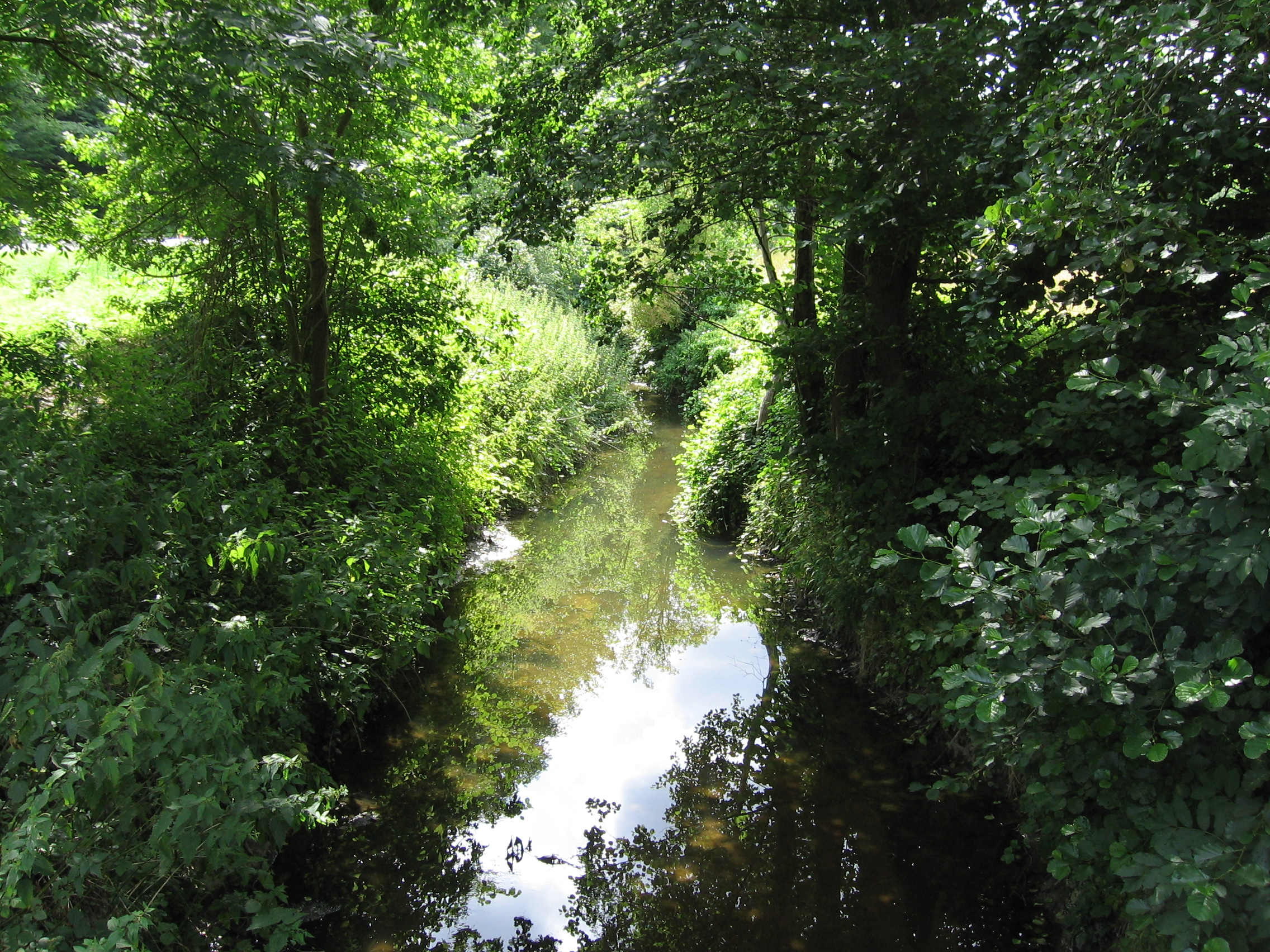 La rivière 'Houyoux', avant qu'elle n'entre dans l'agglomération de Saint-Servais (Namur).